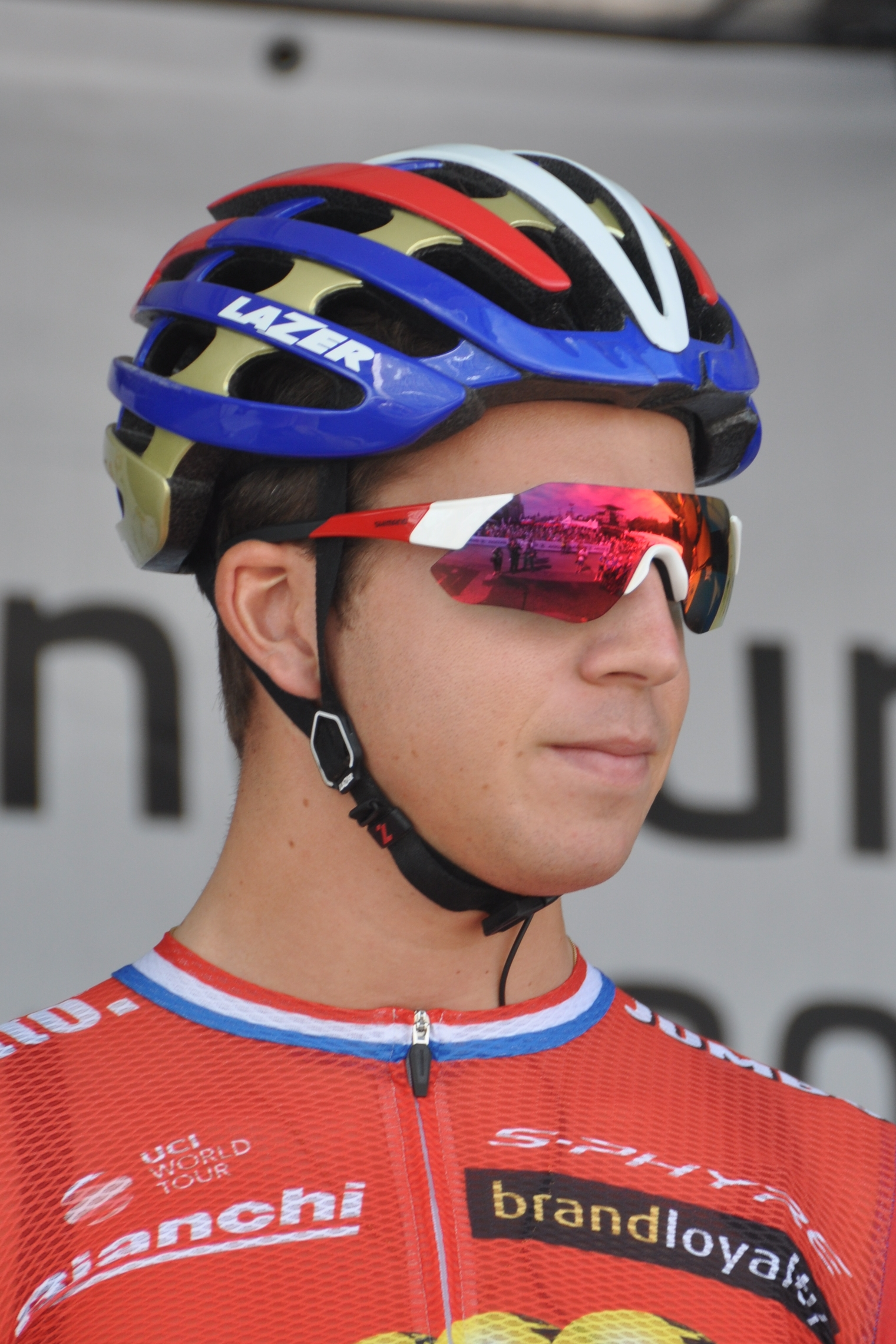 Dylan Groenewegen, niederländischer Radrennfahrer